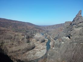 Reka Pčinja kod sela Donja Trnica